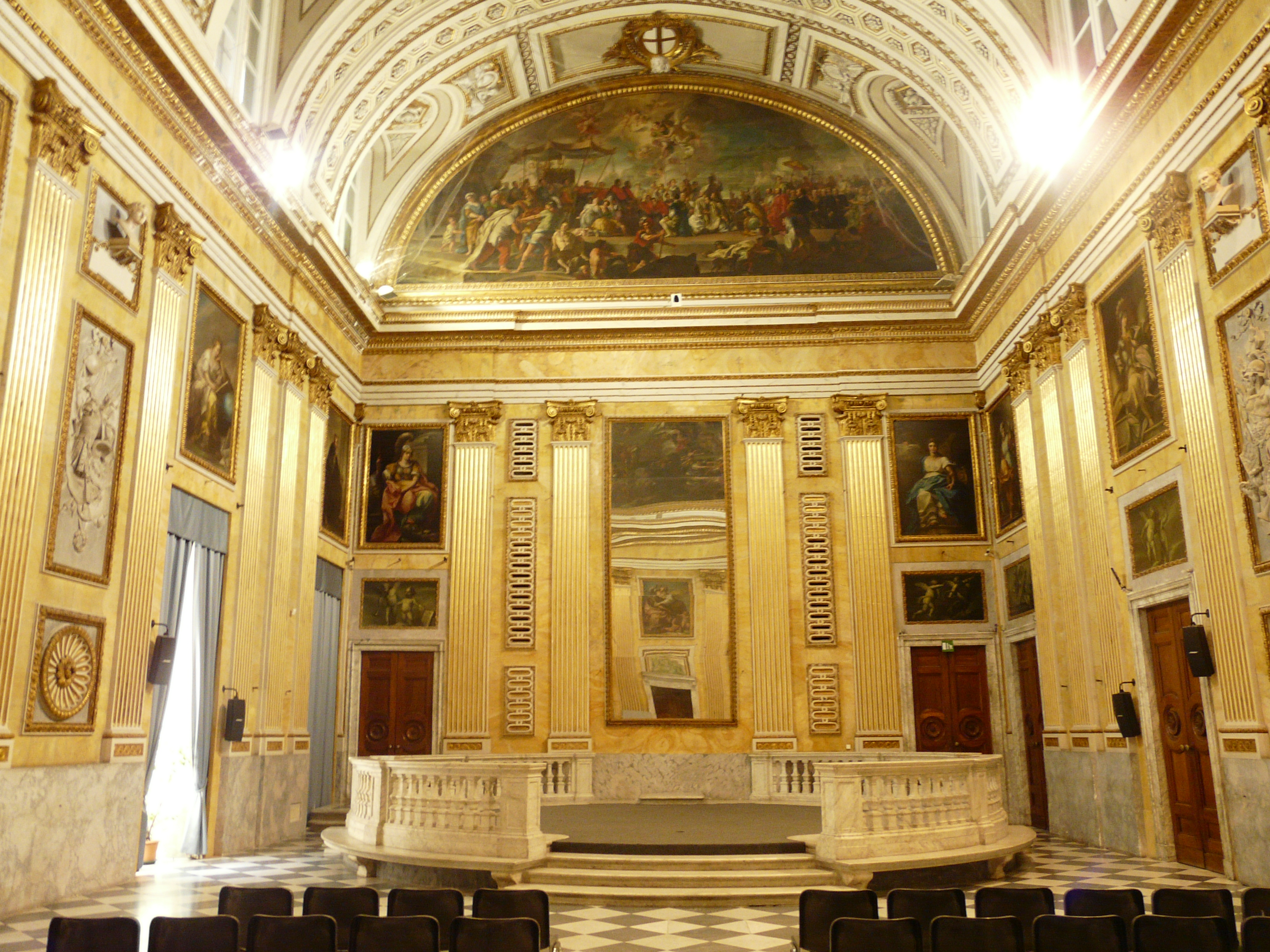 Sala del Minor Consiglio, Palazzo Ducale, Genova, Liguria, Italia